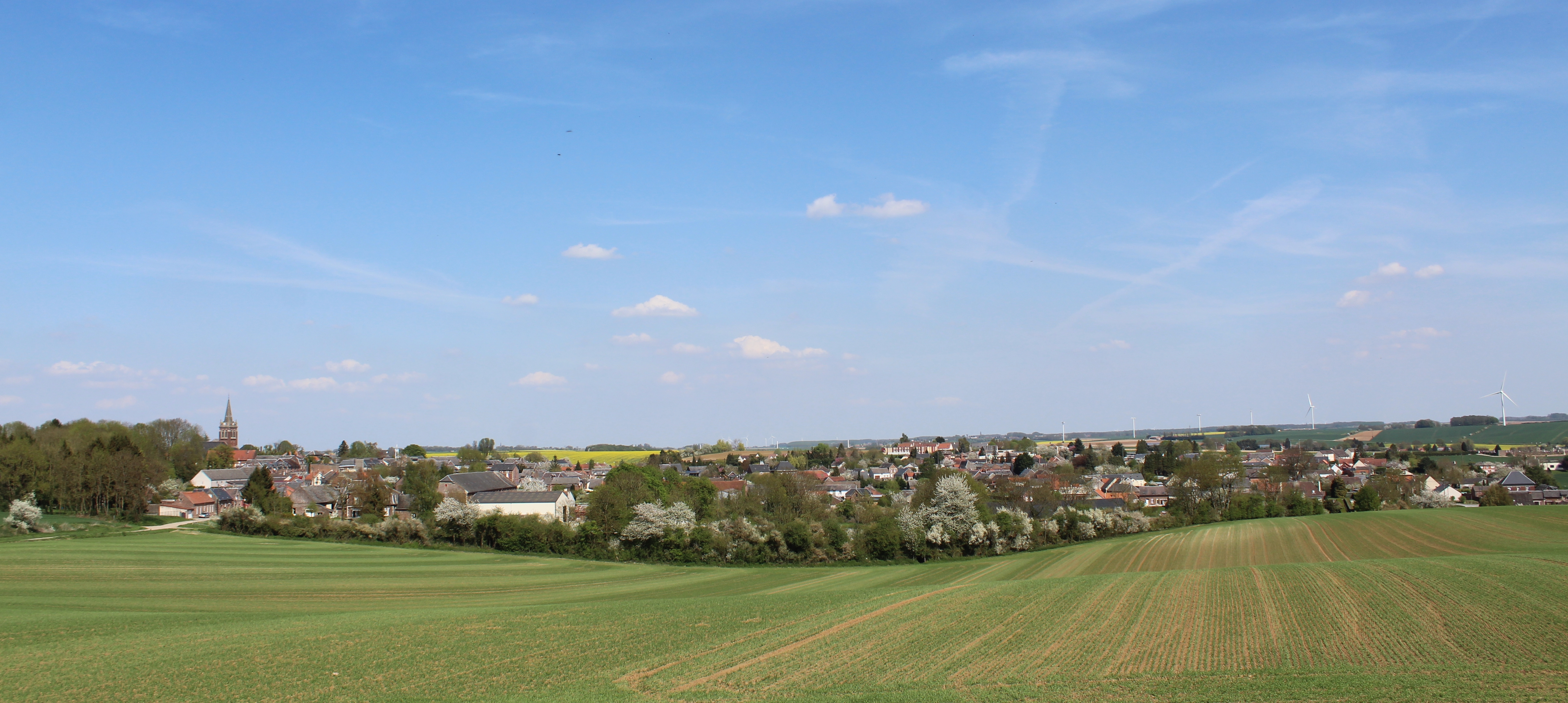 Panorama du village depuis la tour de gué.